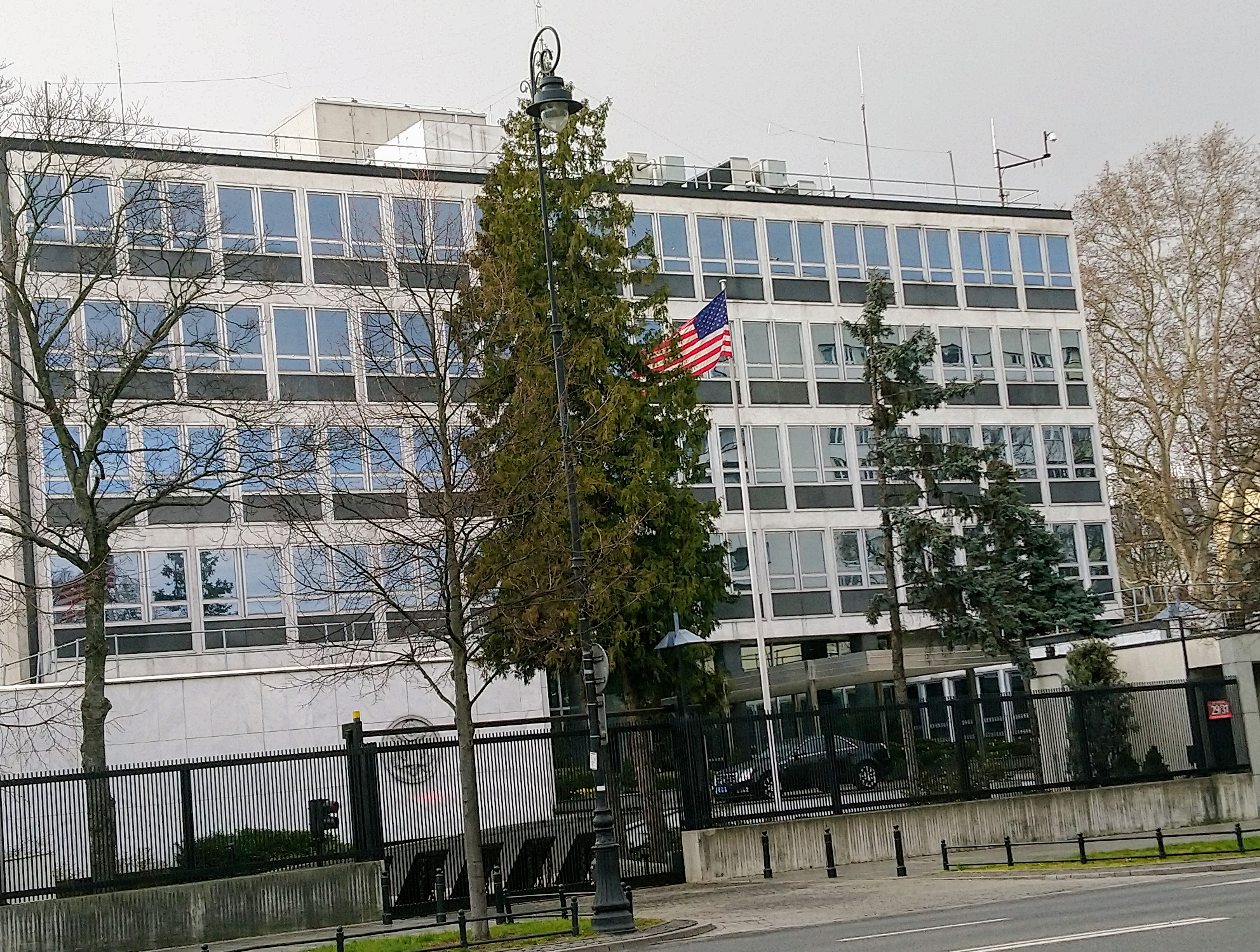 Ambasada USA w Warszawie